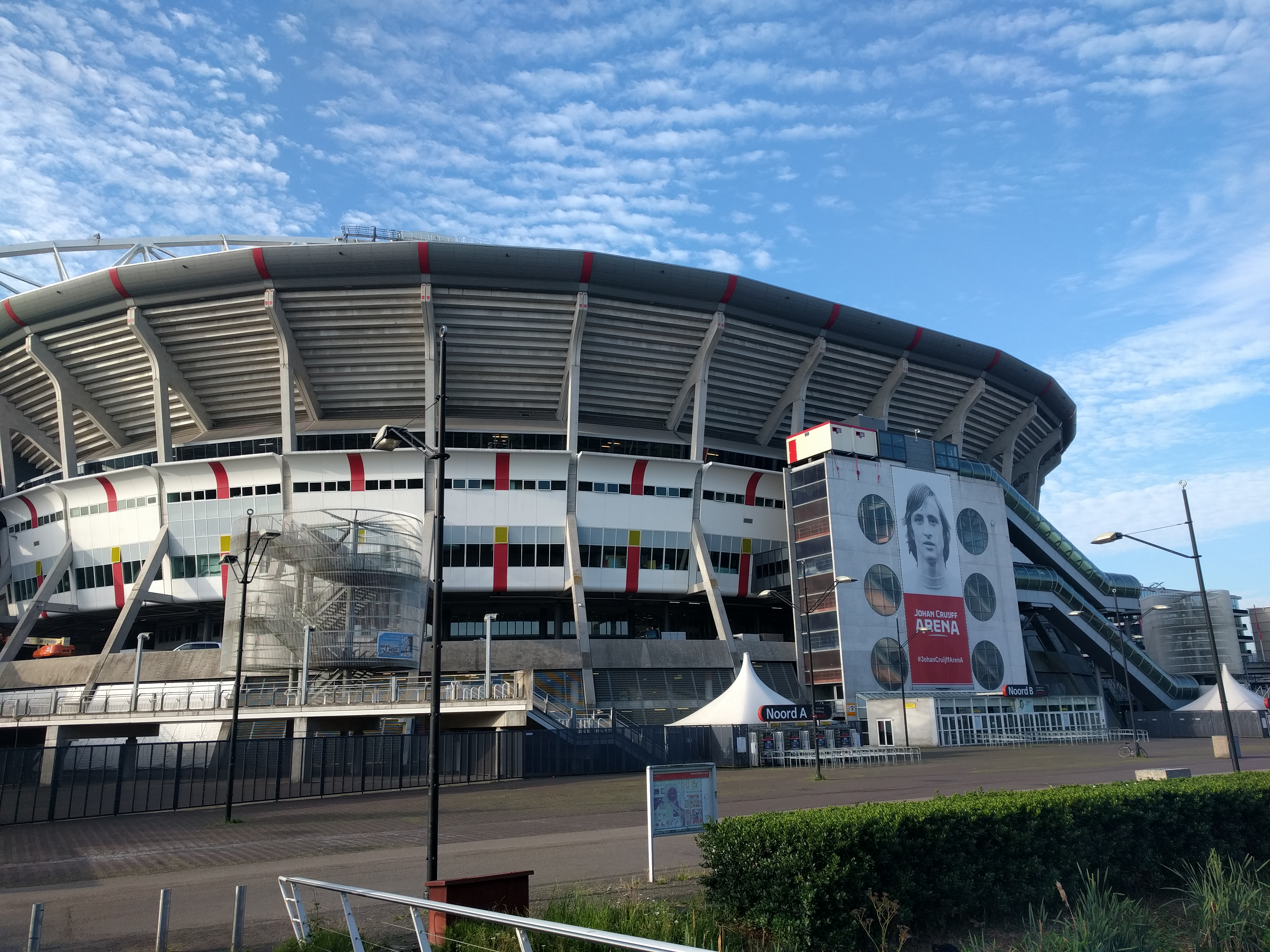 Amsterdam — Johan Cruijff ArenA